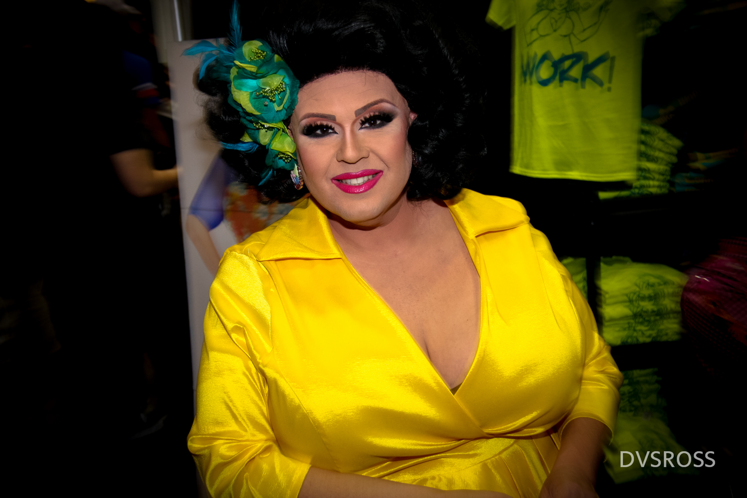 Dekta Work at RuPaul's DragCon LA 2017